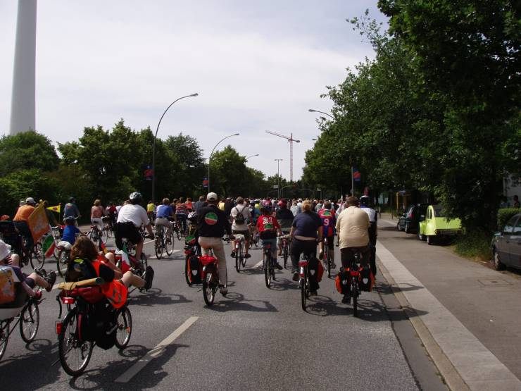 Fahrradsternfahrt Hamburg 2006